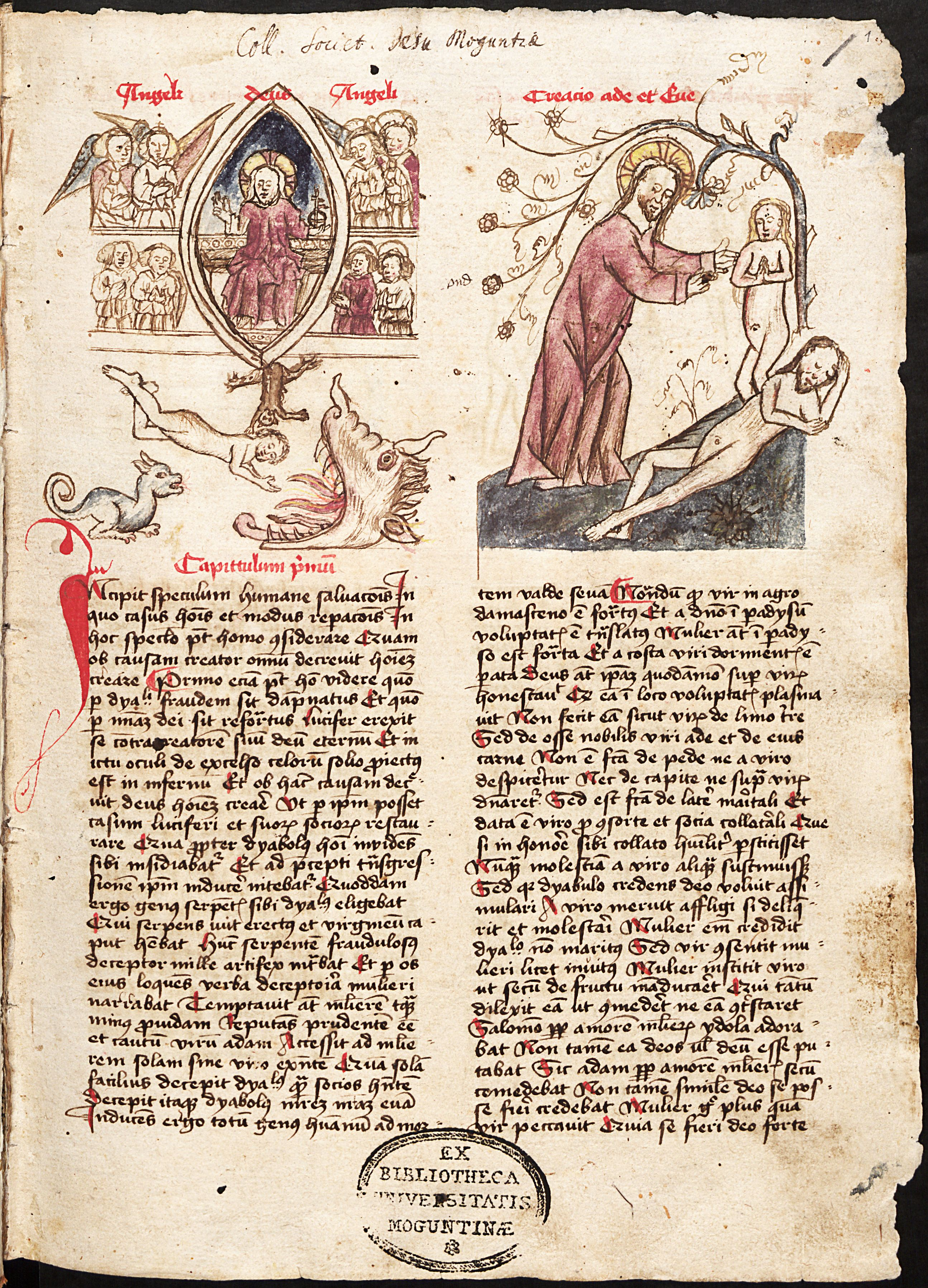 Die Seite zeigt das erste Blatt aus einer spätmittelalterlichen Papierhandschrift (Vorbesitz Mainzer Jesuitenkolleg) mit den Abbildungen "Sturz Luzifers und Erschaffung Evas". Speculum humanae salvationis . - Wissenschaftliche Stadtbibliothek Mainz. Mitte 15. Jahrhundert. Signatur: Hs II 10.